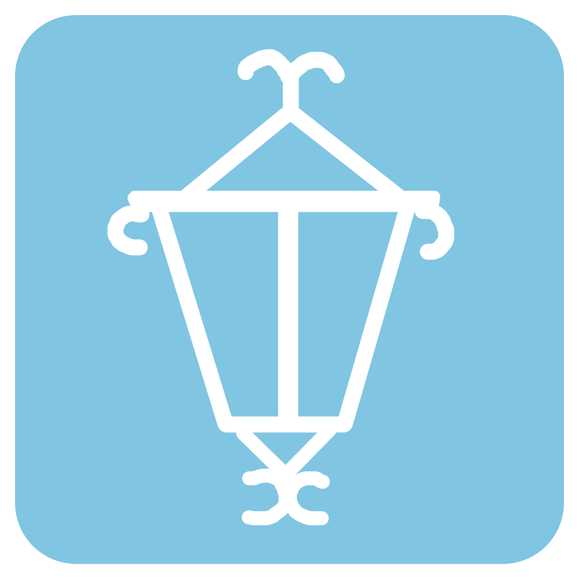 Símbolo utilizado para identificar a la estación Nos en 2001.